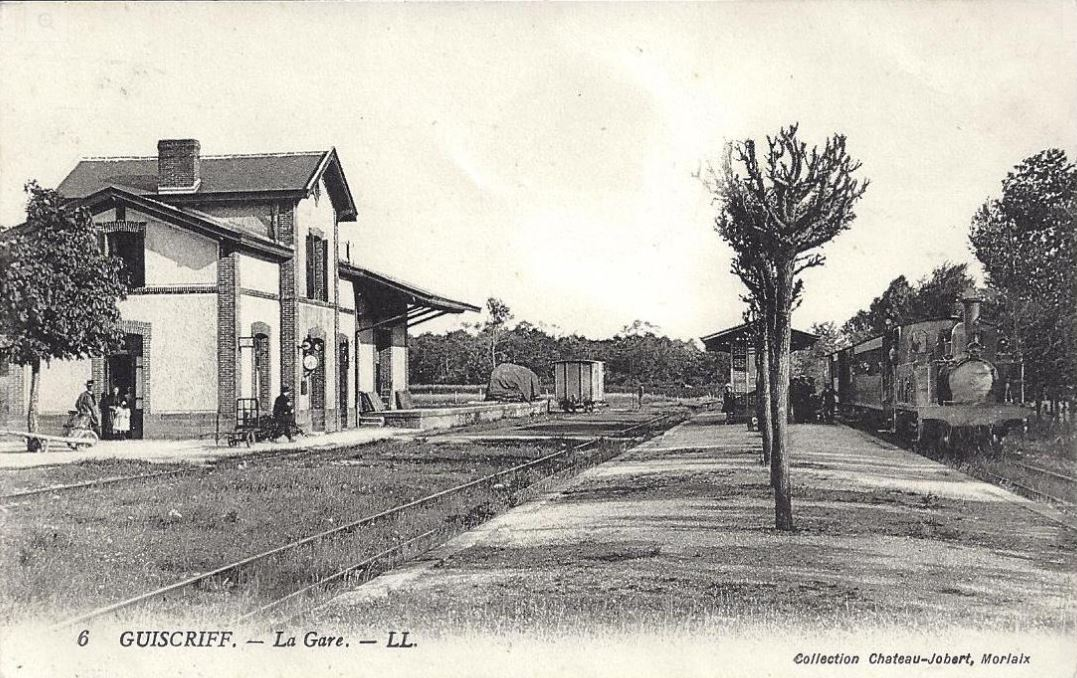 La gare de Guiscriff (Morbihan), un des arrêts de la ligne Carhaix-Rosporden du réseau breton.